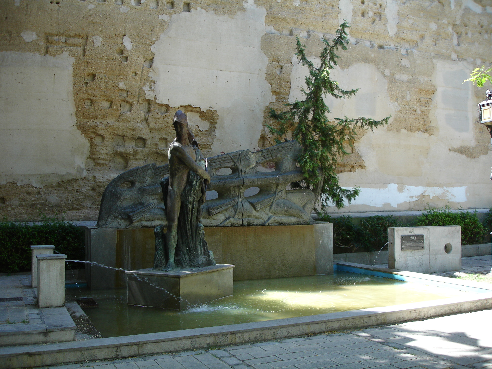 Monumento a Álvar Núñez Cabeza de Vaca en Jerez de la Frontera. Andalusia (Spain).